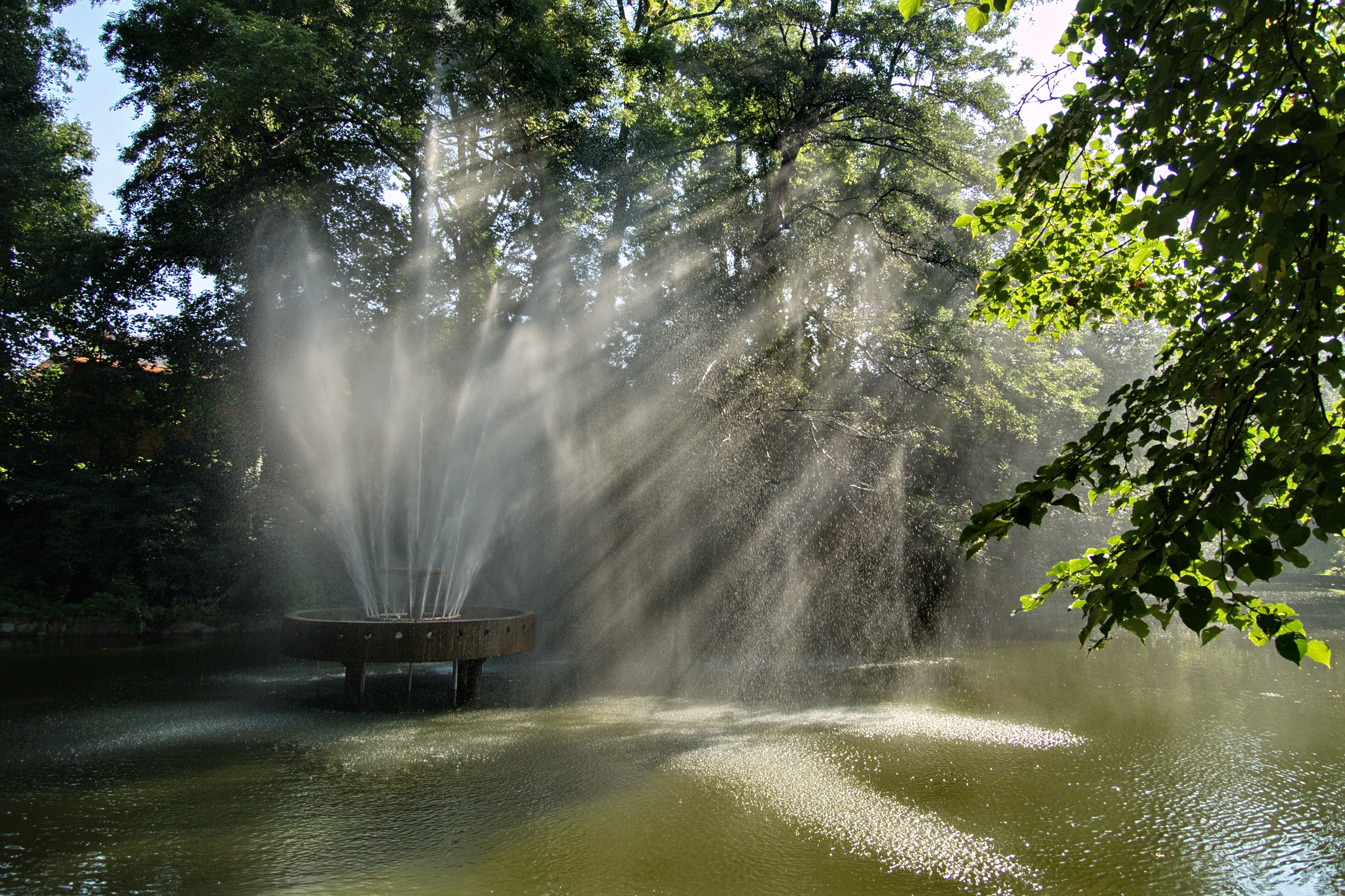 Brzeg - park Centralny w zespole plant miejskich